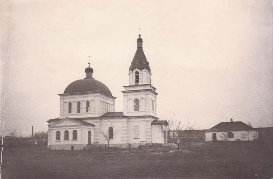 Слобода Аграфеновка-Храм Одигитриевской иконы Божией Матери (Ростовская область).